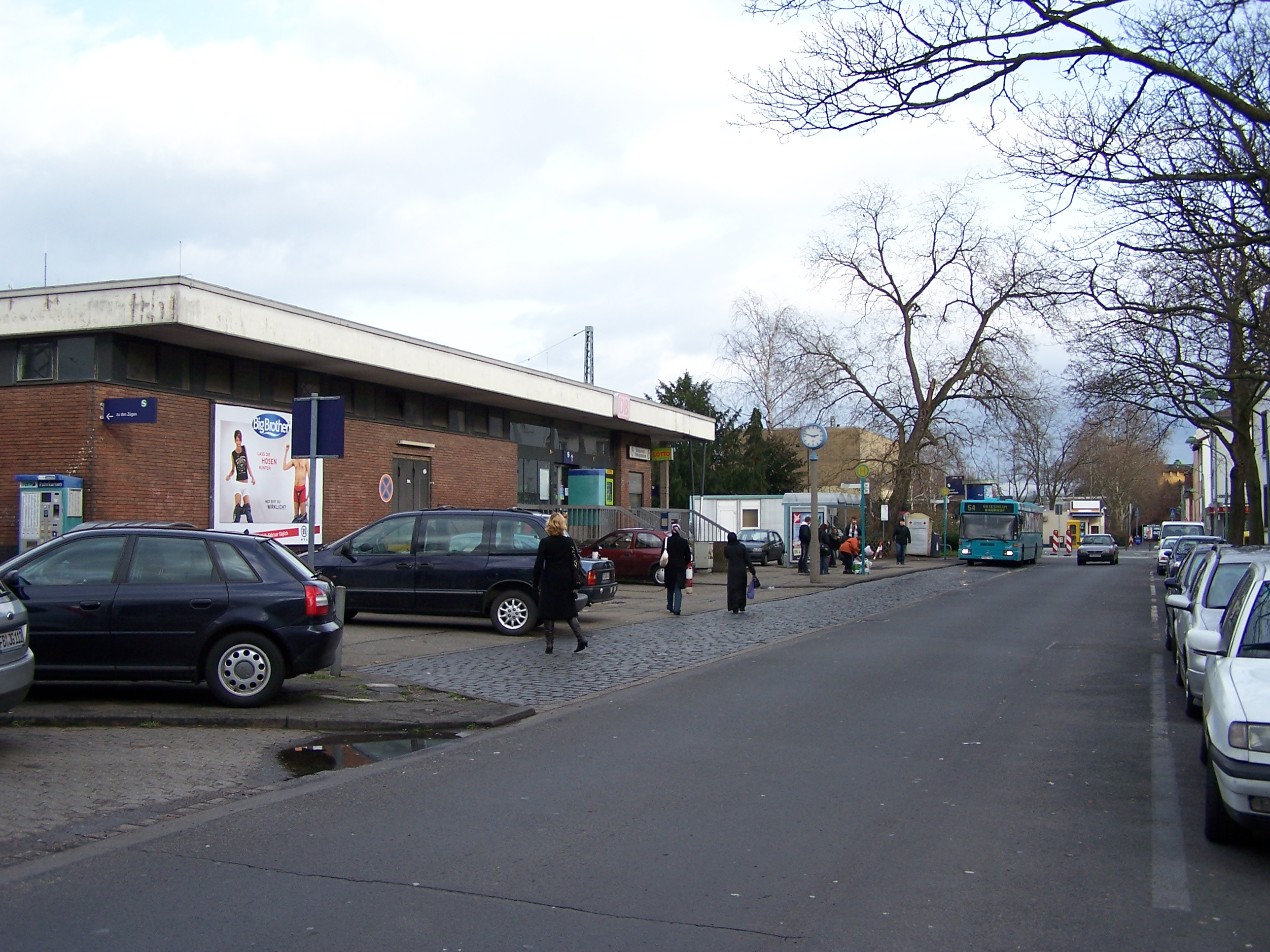 Empfangsgebäude des Bahnhofs Frankfurt-Griesheim mit Bushaltestelle und wartender Stadtbuslinie 54.